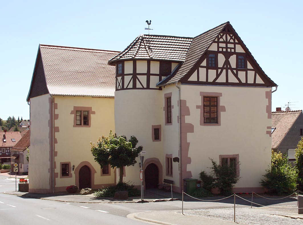 Burgmannenhaus Moritzstein in Wenings (Stadt Gedern), 18. Jahrhundert, Von der eigentlichen Burg ist nur noch das Torhaus und eine Mauer (intrigiert in ein Stallgebäude) vorhanden.